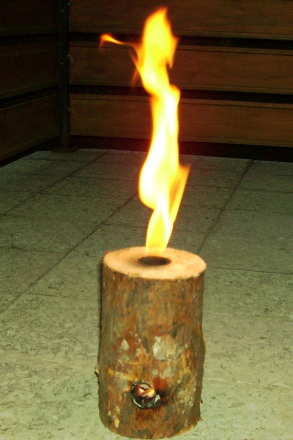 Das Bild zeigt eine soeben angezündete Schwedenfackel